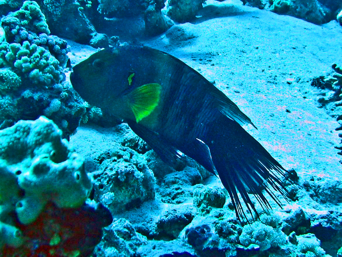 Cheilinus lunulatus, female. Sharm el Sheik, Egypt